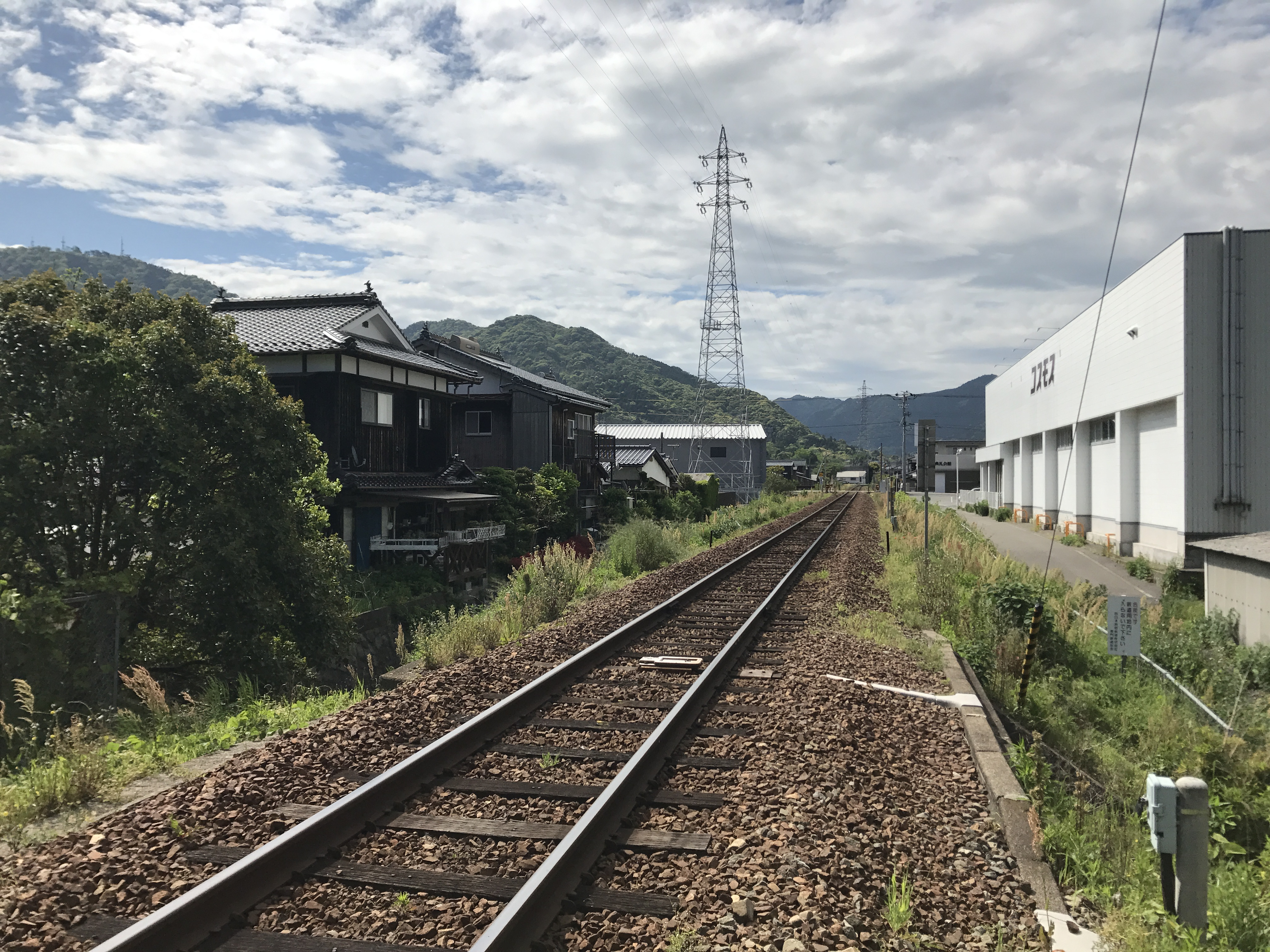 月見川橋梁南側より望む山陰本線・萩方面